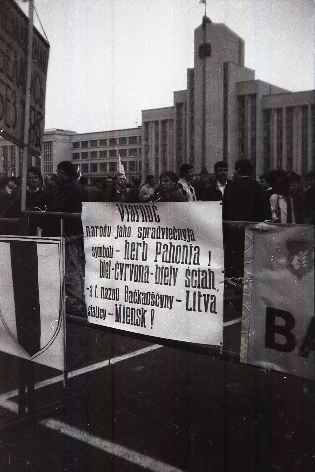 Беларуская (тарашкевіца): Пікет у Менску ля Дому ўраду з плякатам беларускай лацінкай: «Вярнуць народу яго спрадвечныя сымбалі: гэрб Пагоня й бел-чырвона-белы сьцяг, — а таксама назоў краіны ЛІТВА, сталіцы — Менск!» (19 верасня 1991 г.).